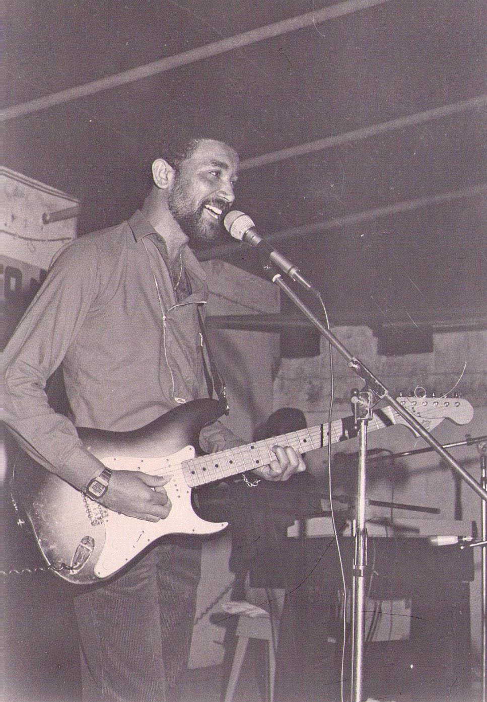 Djô D´Eloy